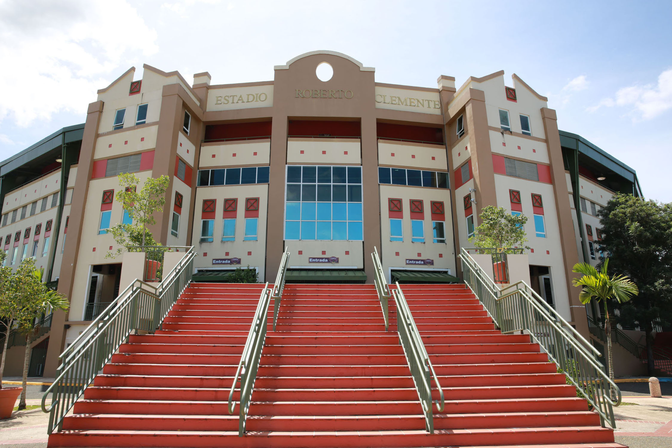 Hogar de los Gigantes de Carolina en la LBPRC